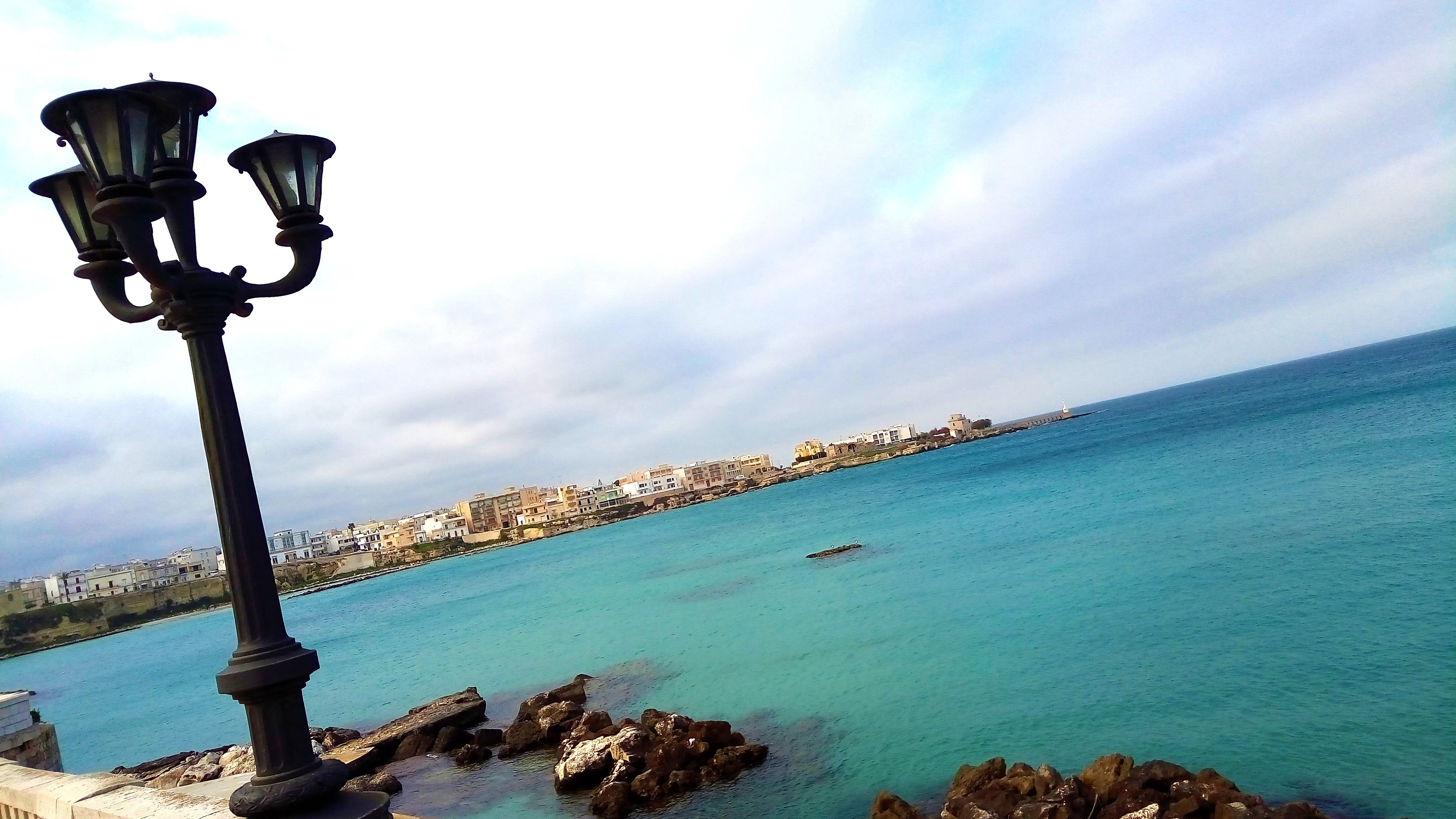 Veduta dal Lungomare degli Eroi.